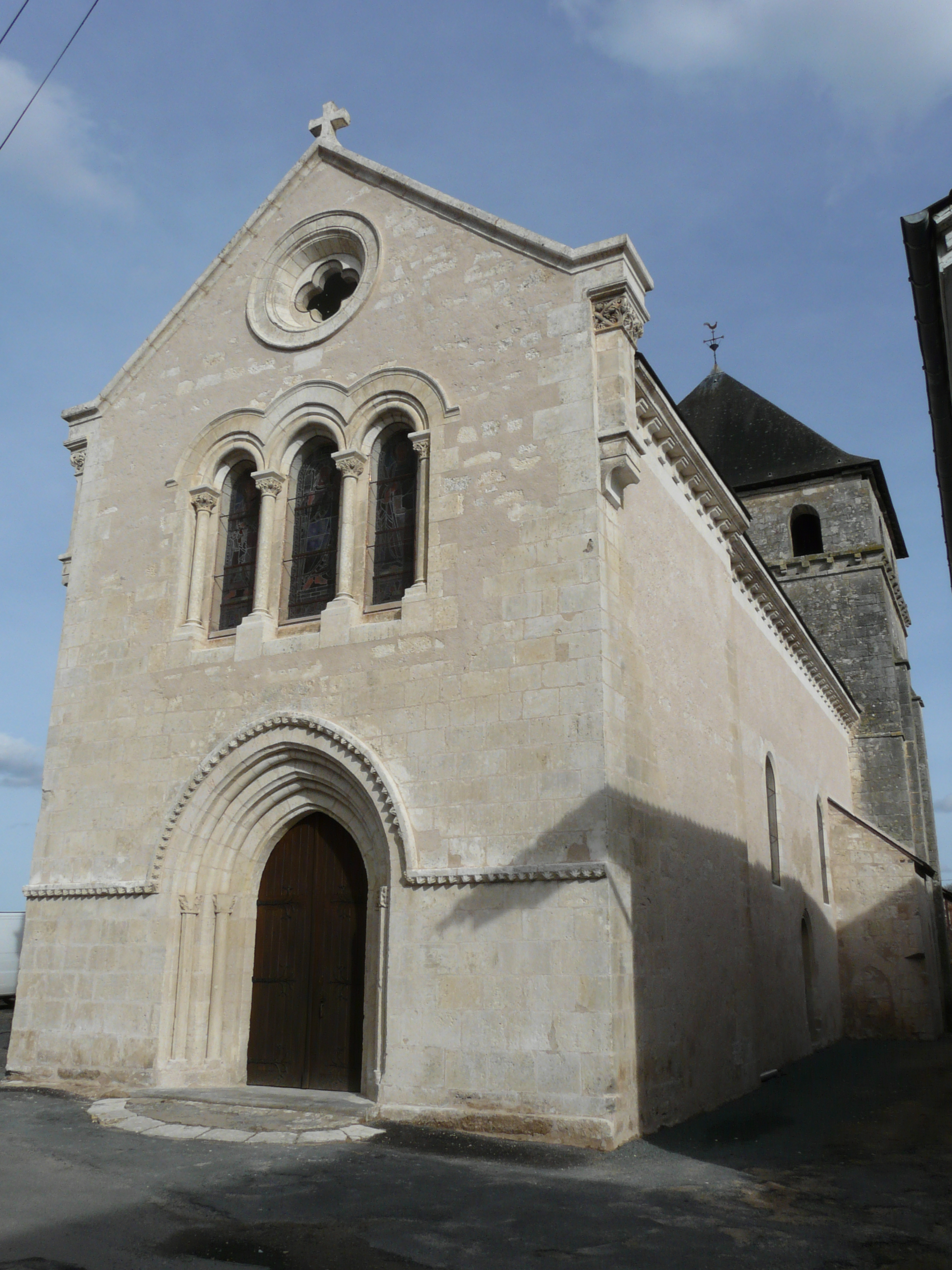 La façade ouest de l'église Saint-Martin, Coulaures, Dordogne, France